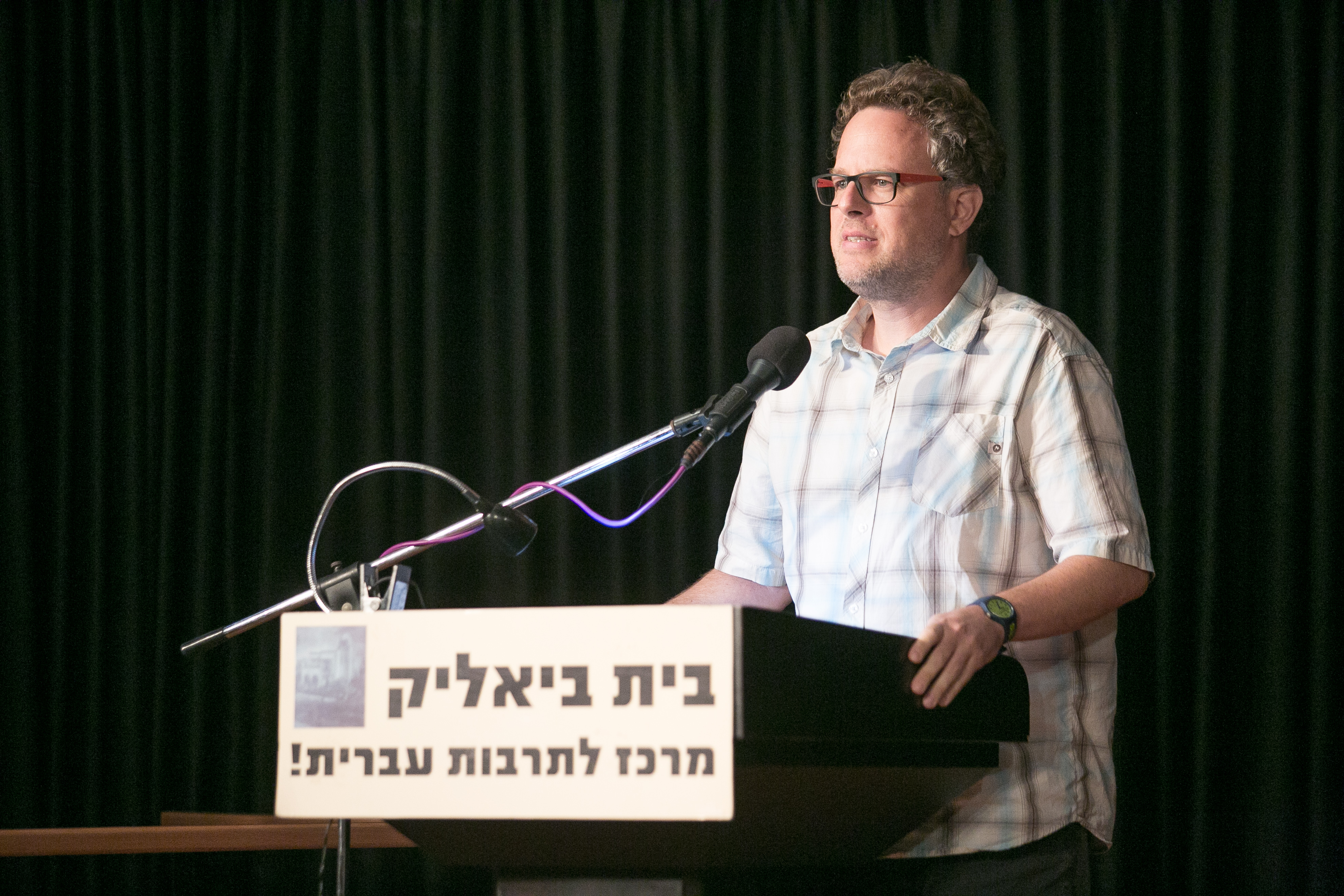 2017. תצלום: נטע אלונים